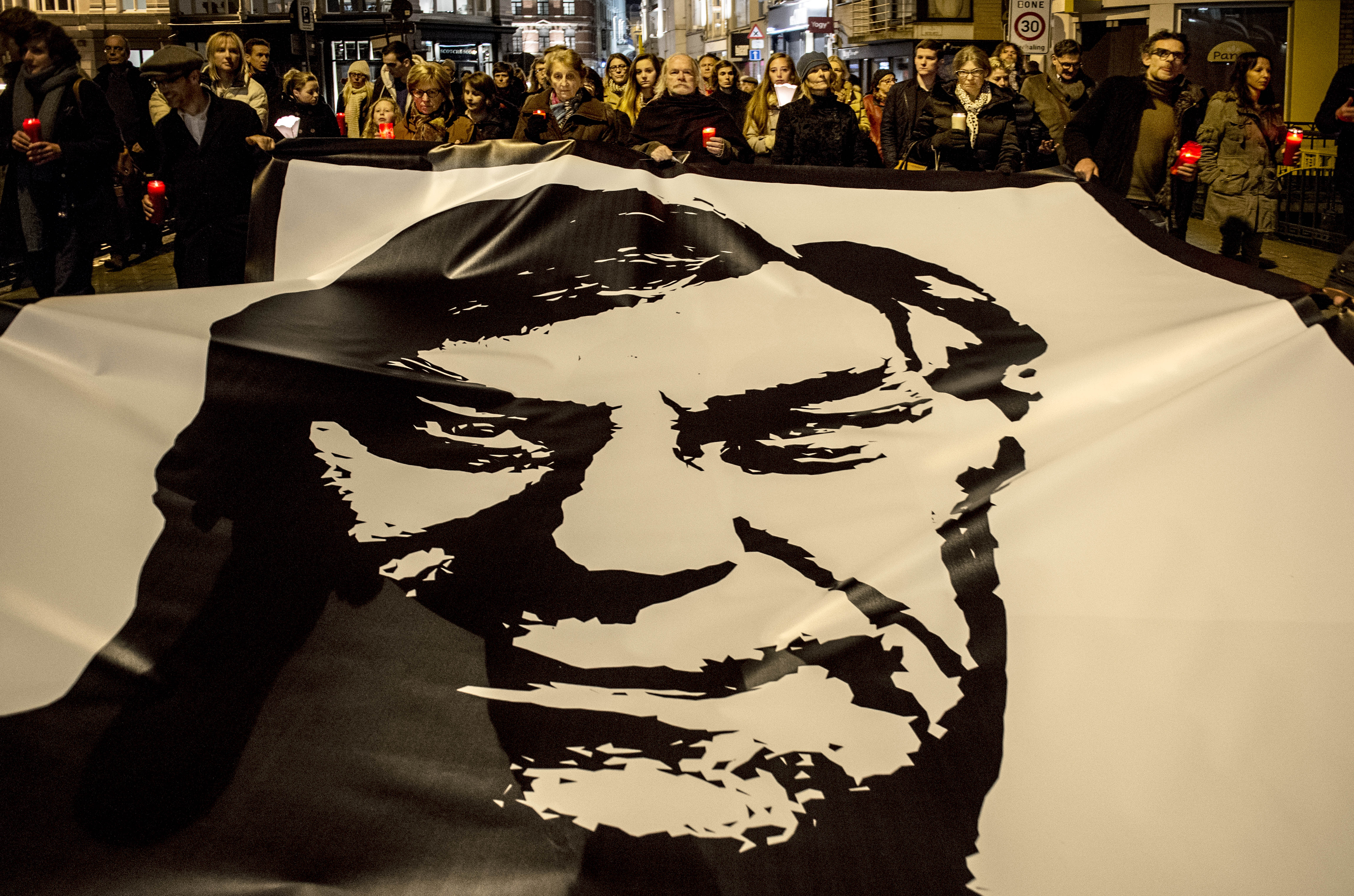 Een 300-tal mensen stappen op in een rouwstoet door Gent van het SMAK naar Sint-Baafs, de avond voor Jan Hoets begrafenis.